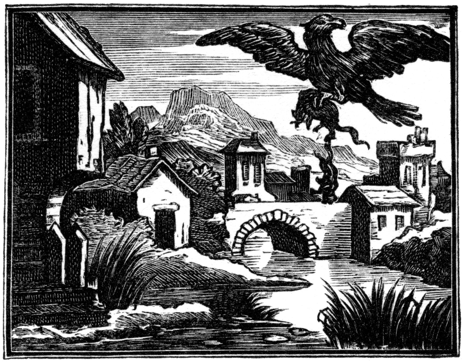 Illustrations pour les « Fables choisies mises en vers par M. de la Fontaine », Claude Barbin et Denys Thierry, Paris, 1668 (premier recueil) 1678-79 (deuxième recueil) 1694 (troisième recueil). Numérotation Charpentier (1705).